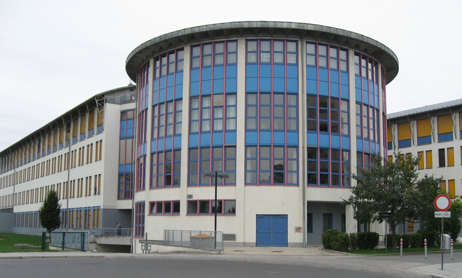 Wien Ganztagsvolksschule Hammerfestweg in Wulzendorf